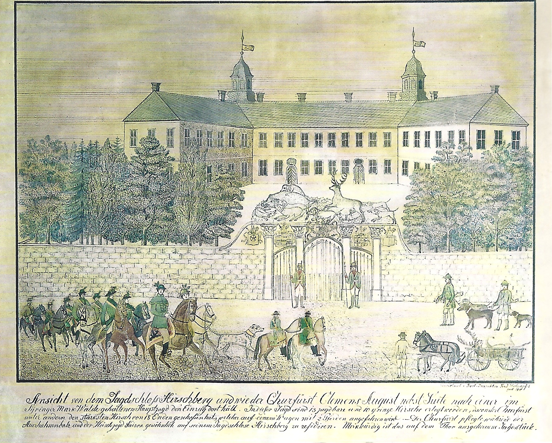 Schloss Hirschberg - Rückkehr des Kurfürsten Clemens August (1700 - 1761) vom Jagdzug